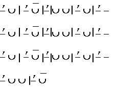 Strophe Sapphica